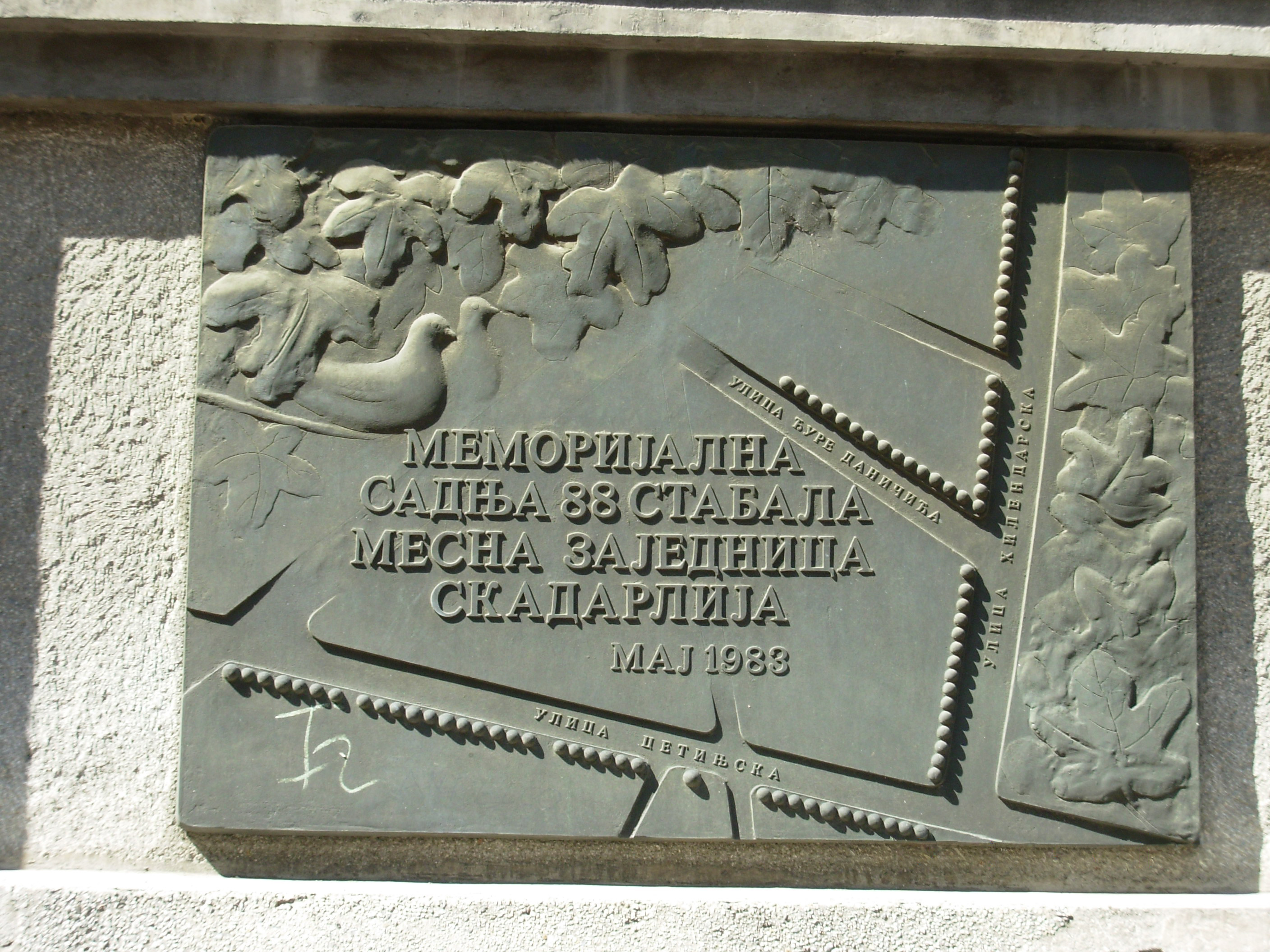 Спомен плоча акцији 88 стабала, сликао Голдфингер